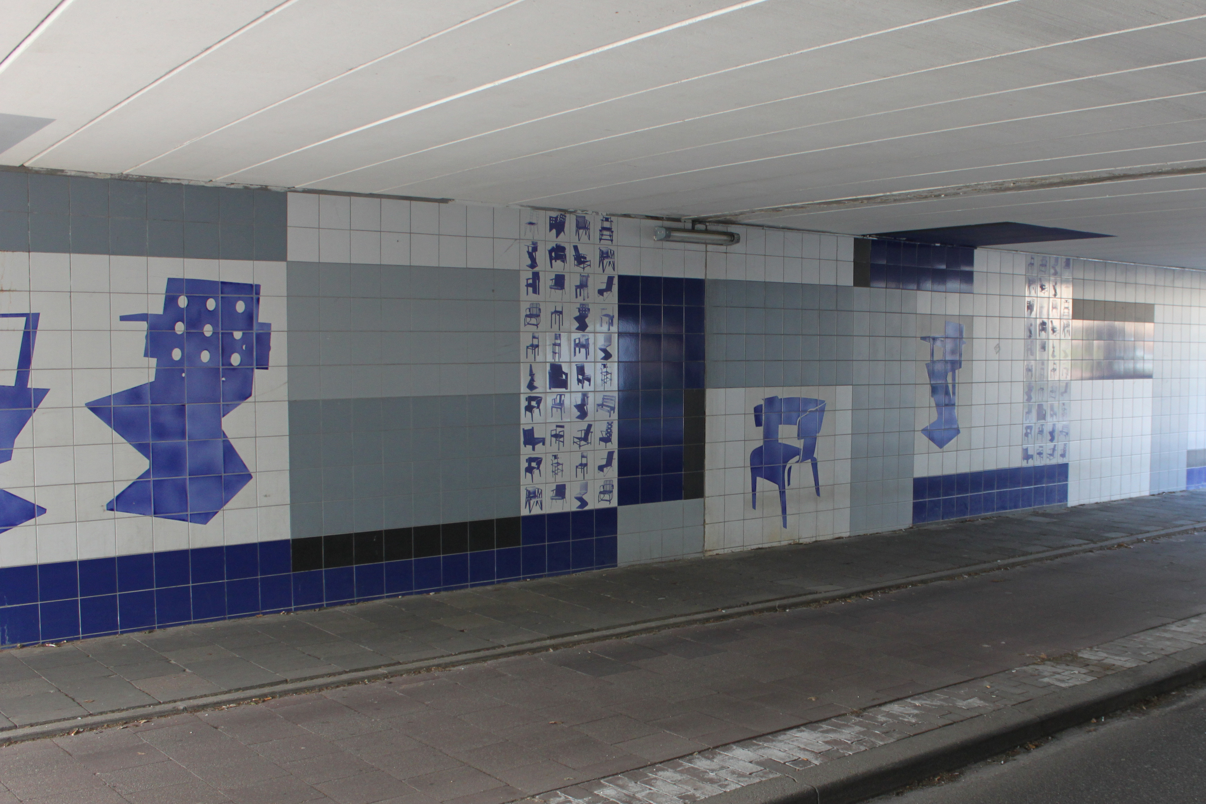 Viaduct naast het Rietveld-Schröderhuis in Utrecht getiteld "Sitting in Blue" uit 2000 door kunstenaars duo Berkman & Janssens.